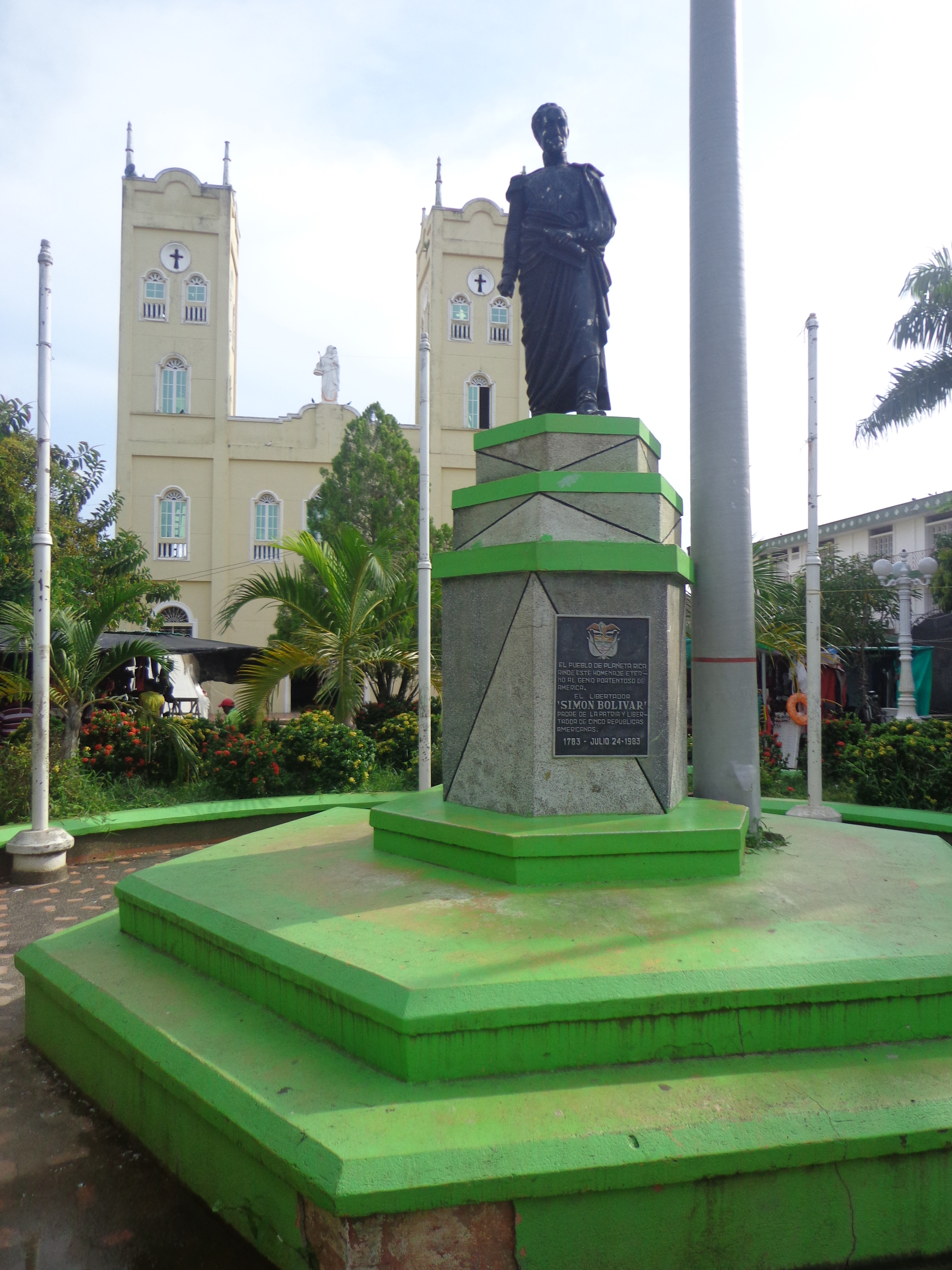 Ubicación: PLANETA RICA, CÓRDOBA